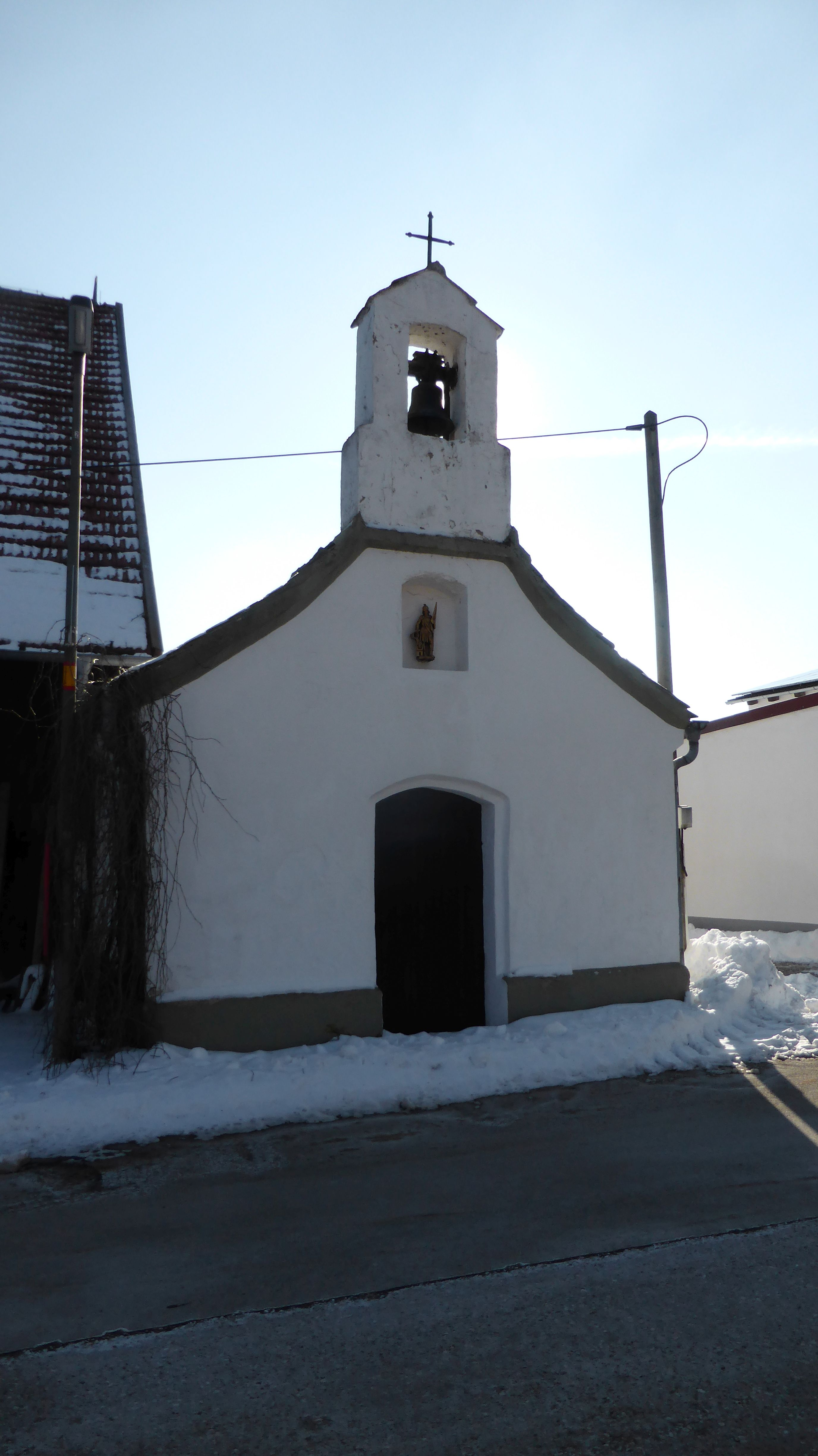 Hausraitenbuch, Hofkapelle (Hohenfels)